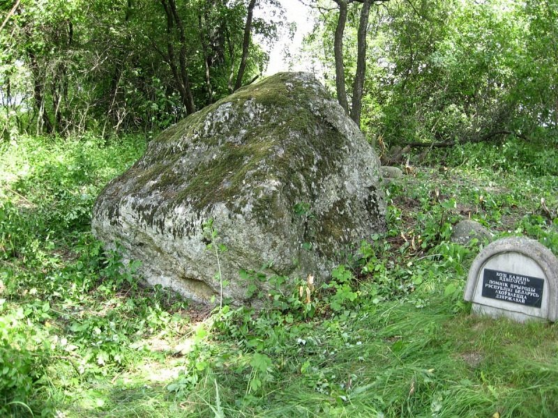 Камяніца. Козі камень Ядвігаўскі